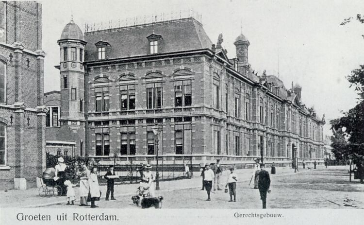 Paleis van Justitie - Noordsingel in Rotterdam. Foto van prentbriefkaart, fotograaf onbekend.